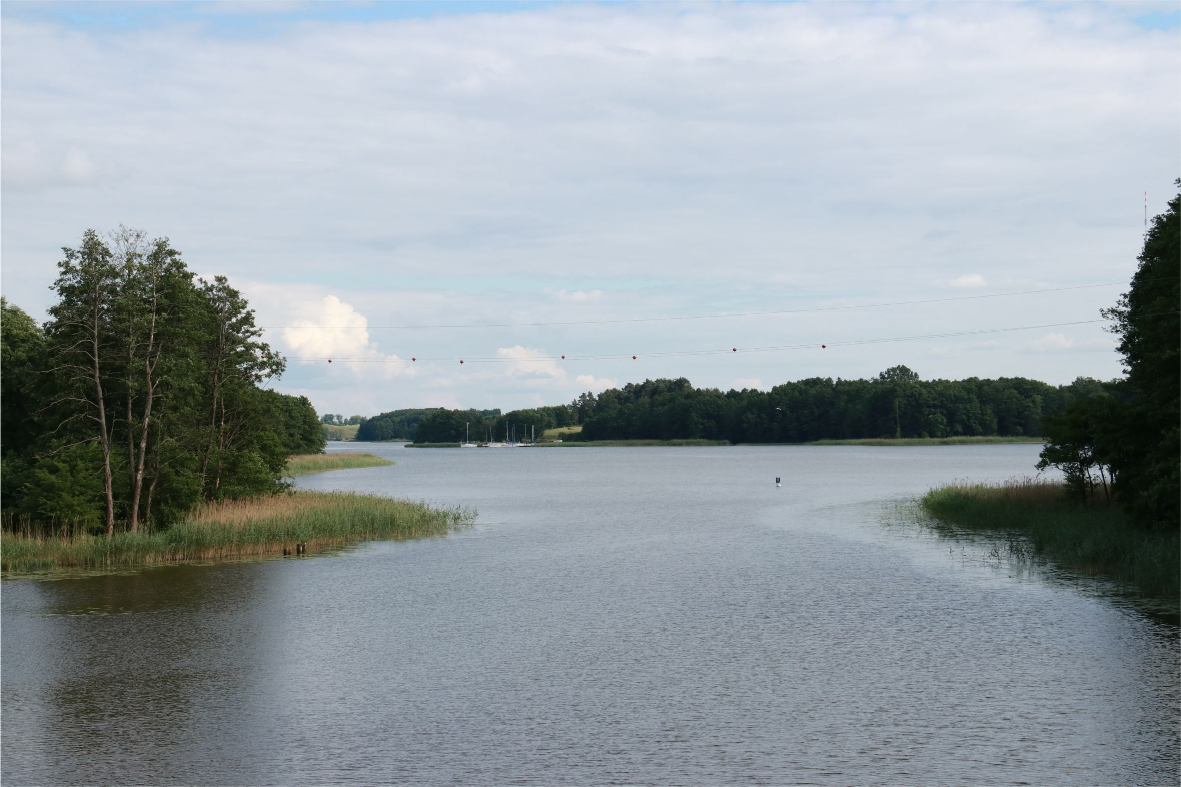 Hessen-See Richtung Kleszczewo (Miłki, deutsch Brassendorf)